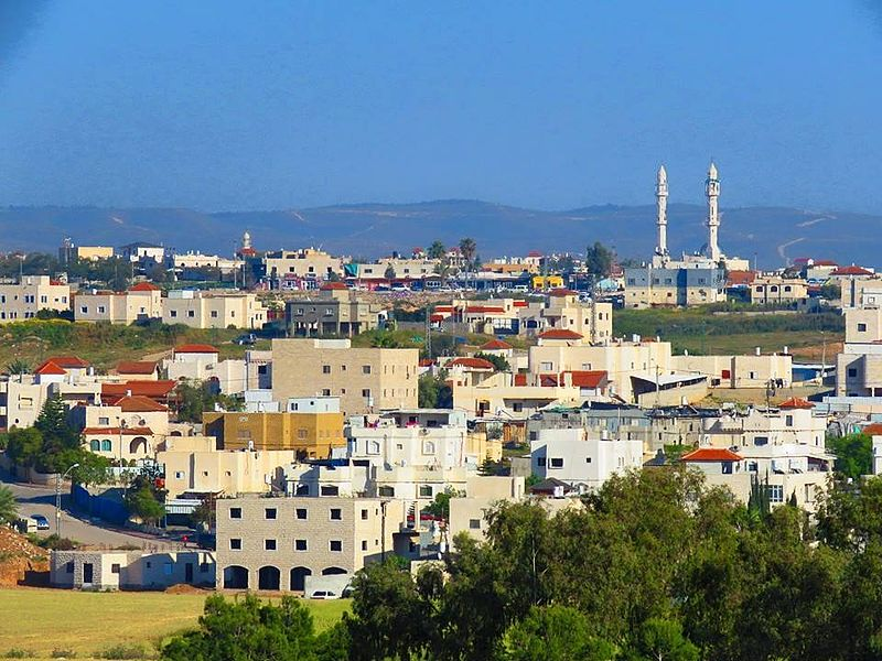 מבט על העיר רהט